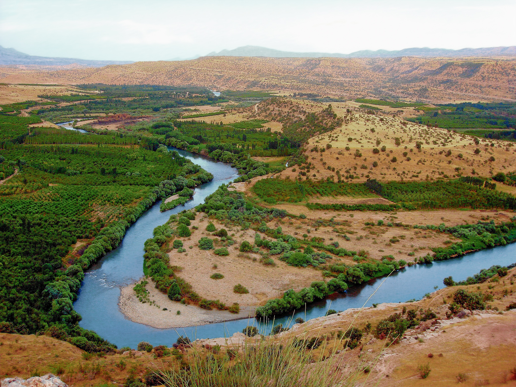 Greater Zab River near Erbil Iraqi Kurdistan